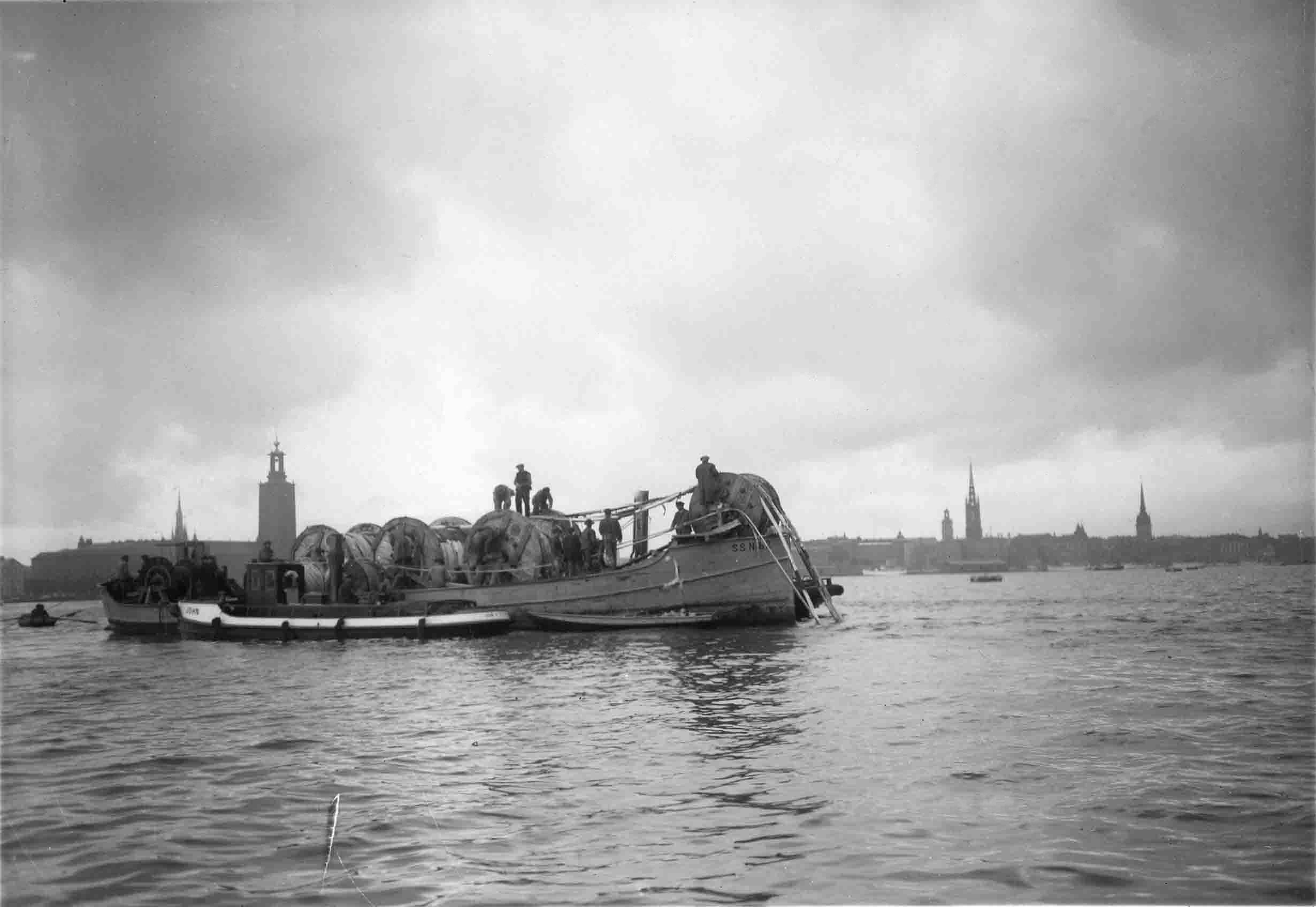 Läggning av elkablar i Riddarfjärden i Stockholm